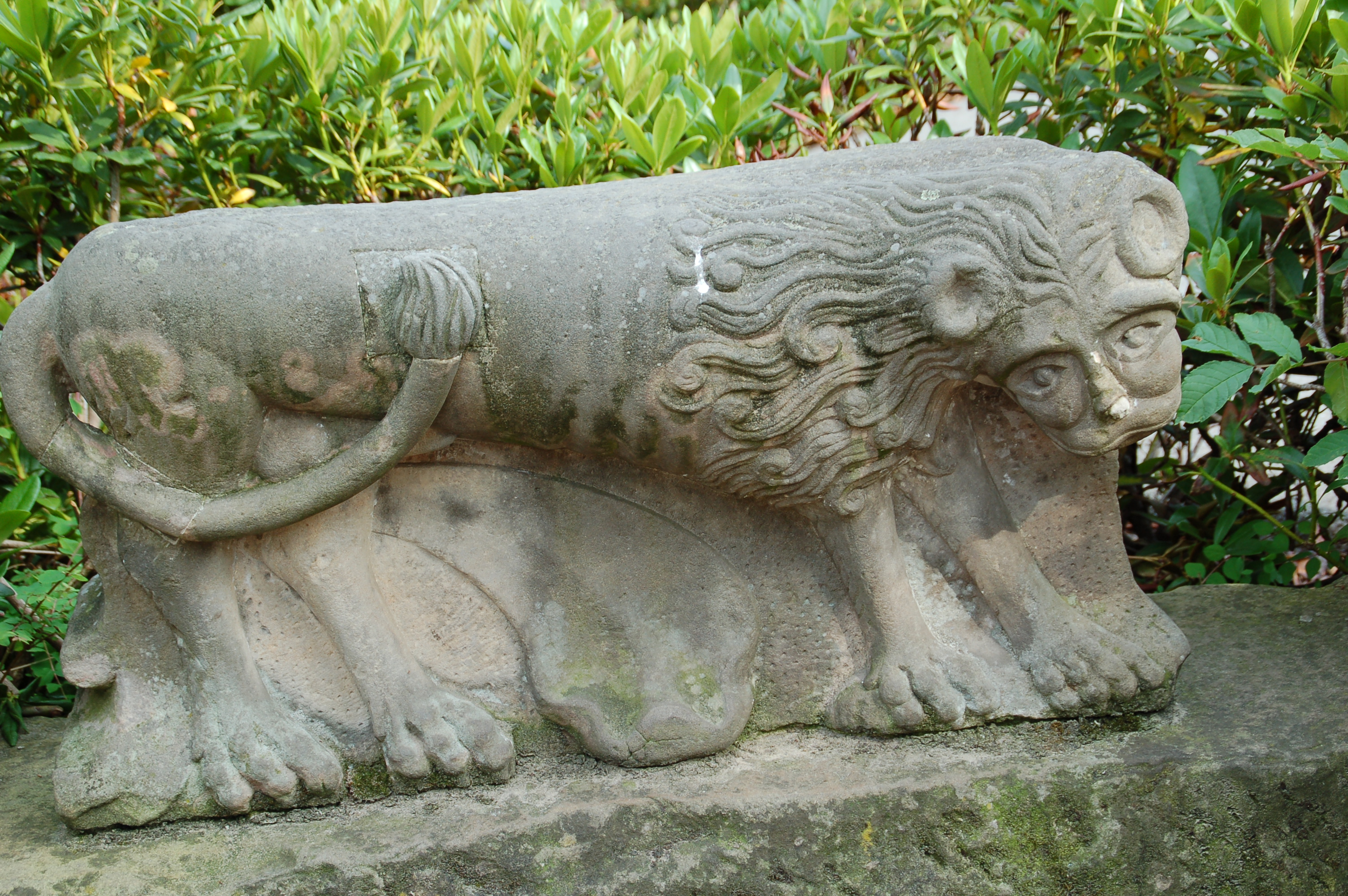 Nordhorn, Bentheimer Sandsteinlöwe